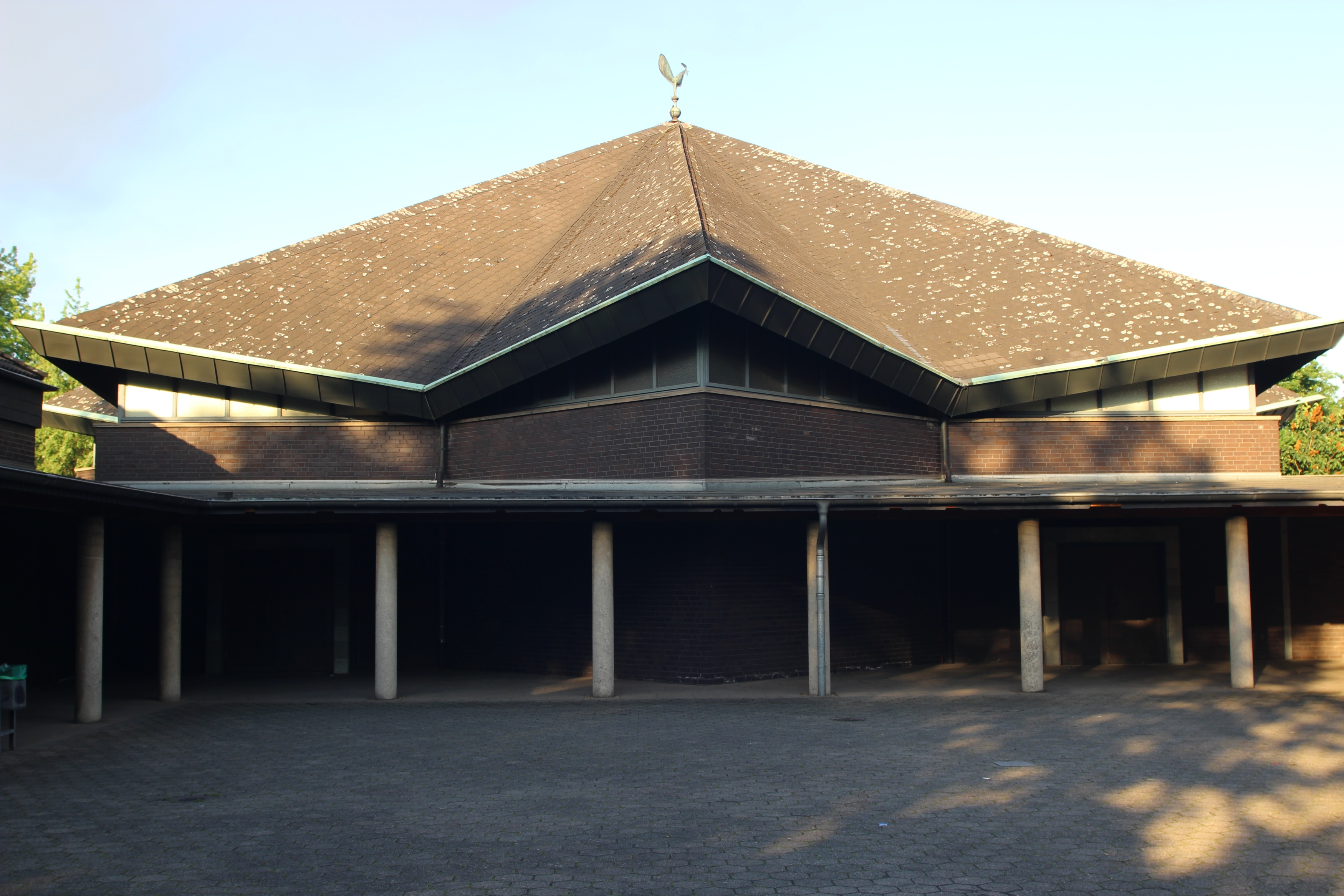 Kirche St. Hildehard in Duisburg Röttgersbach